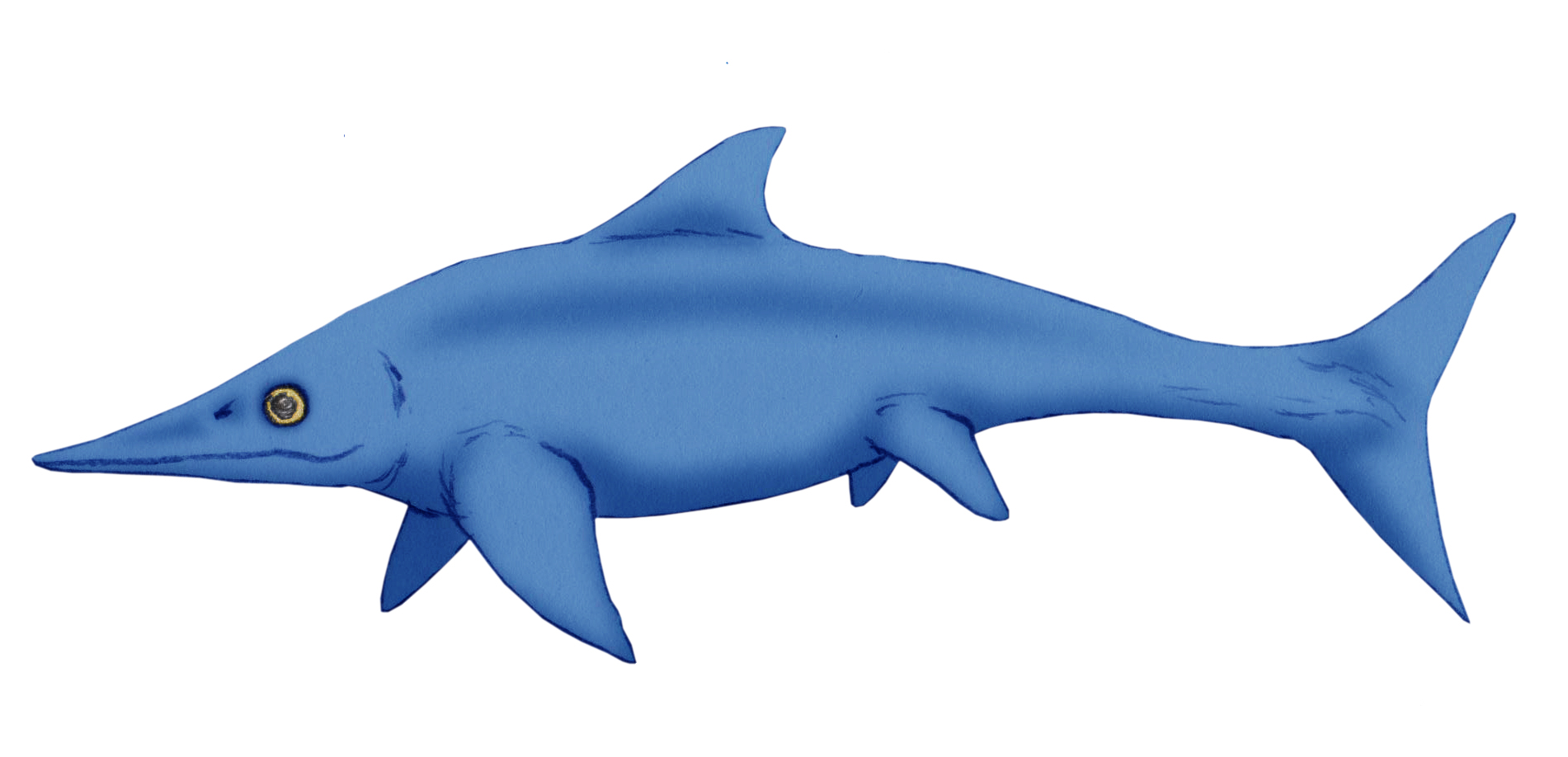 Restoration of Malawania